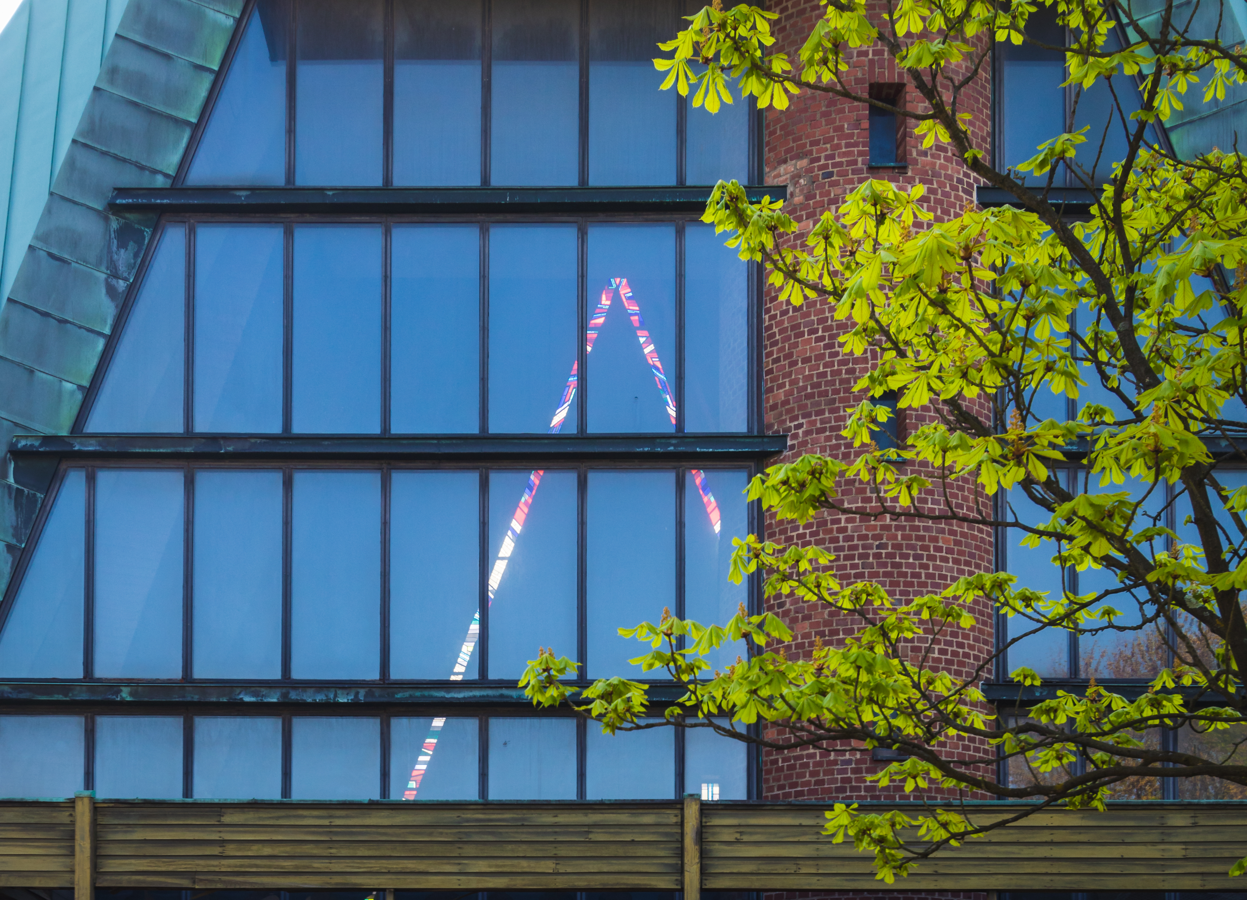 St. Johannes der Evangelist (Köln-Stammheim), Architekt: Karl und Gero Band; seit 2018 zur Profanierung und Abriss vorgesehen.